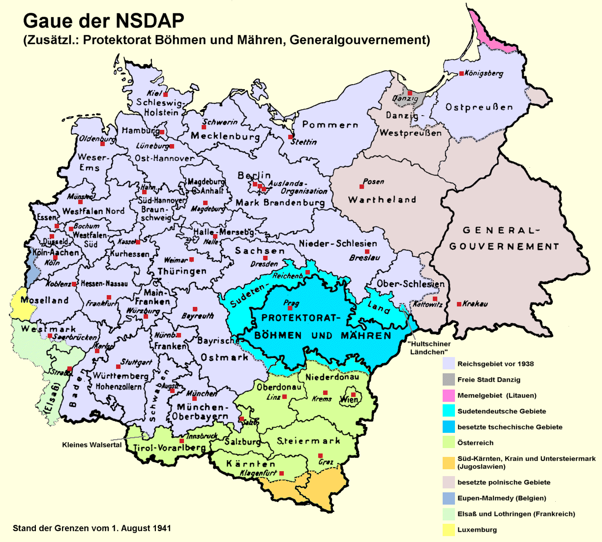 NSDAP Gaugrenzen und besetzte Gebiete, 1941. Selbst auf Basis von zeitgenössischen Quellen gezeichnet.